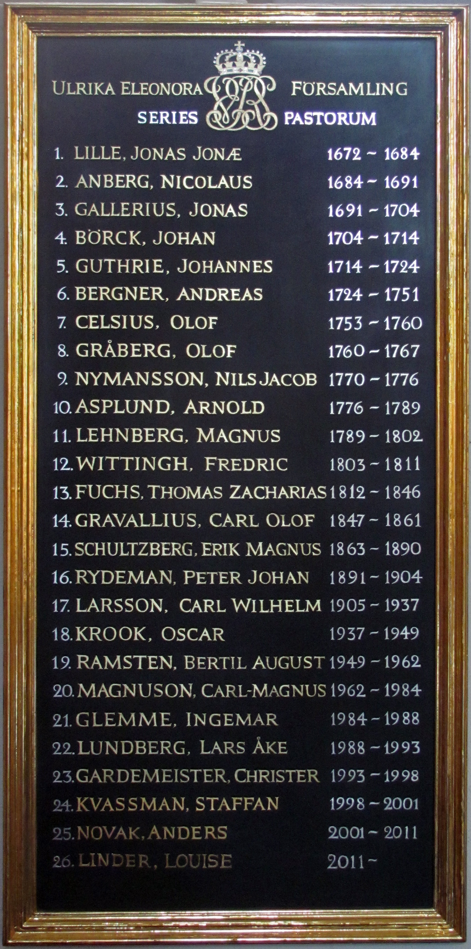 Ulrika Eleonora församling, series pastorum